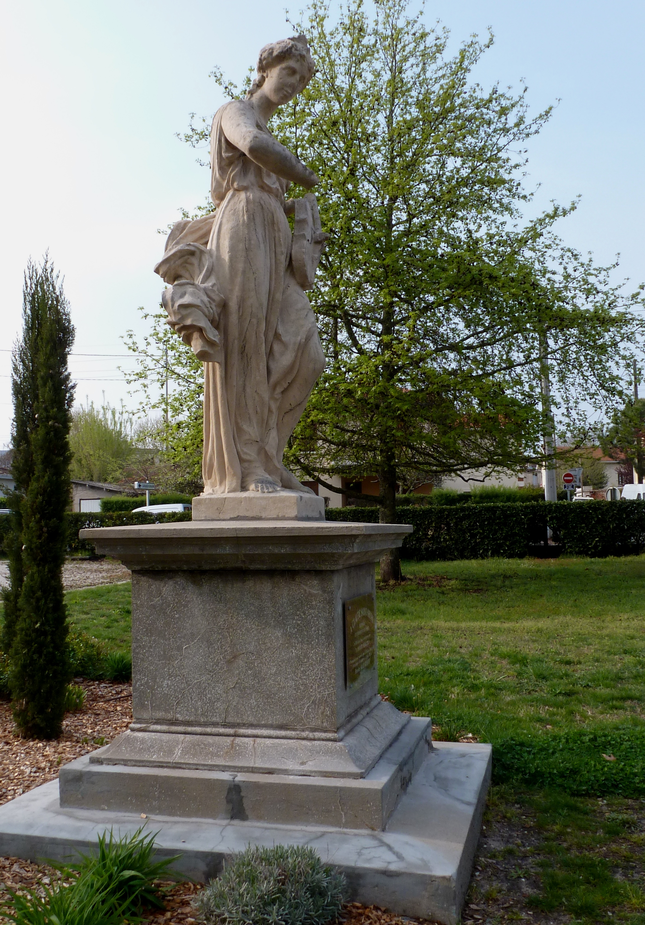 Statue "La Musique" installée en 1936 dans le parc Razon à Pessac-33. Œuvre du sculpteur parisien Louis Schroeder (1828-1898) ; elle faisait partie des statues thématiques des Jardins du Trocadéro pour l'Exposition universelle de 1878 qui ont été démontées avant celle de 1937.